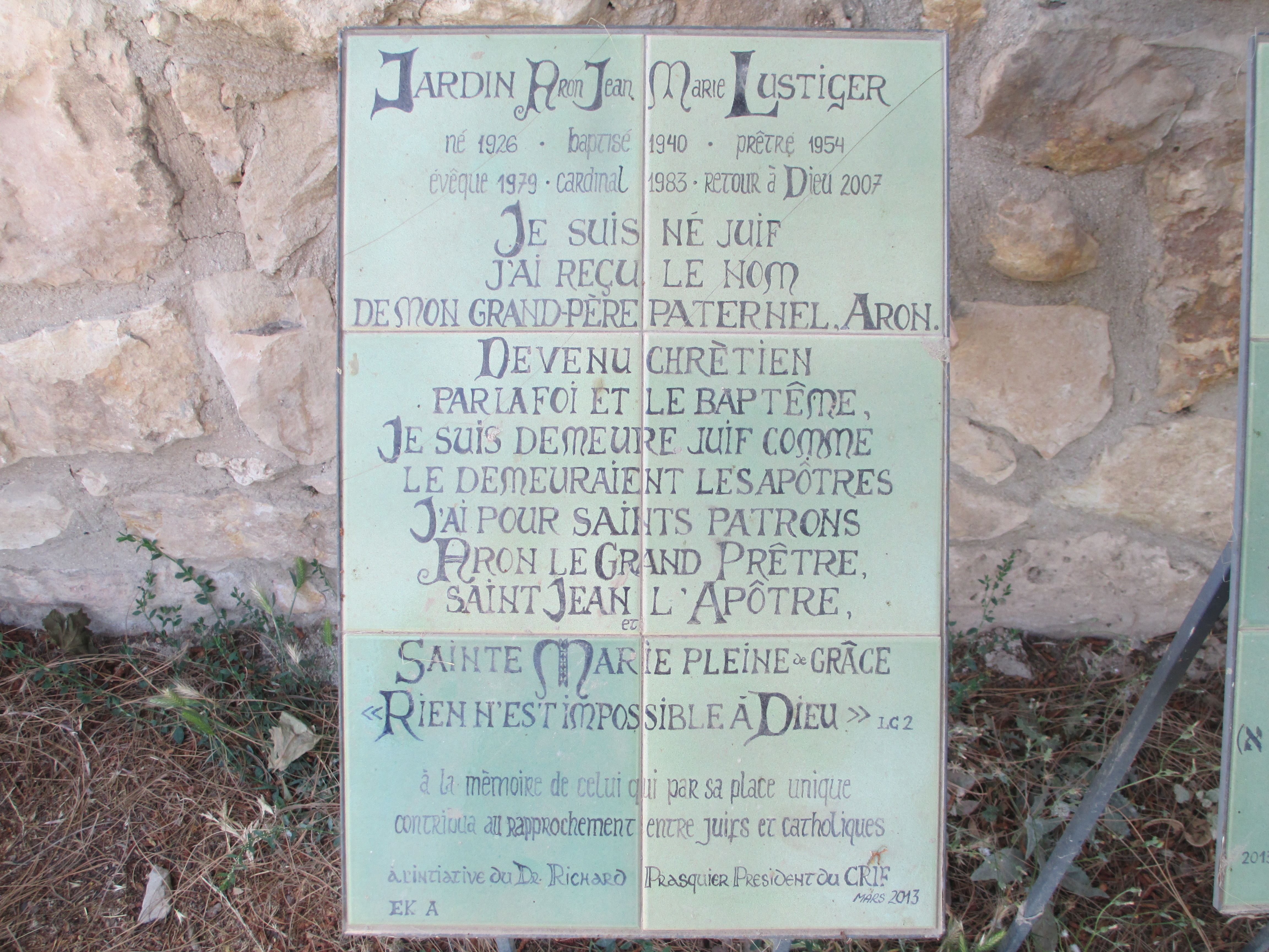 גינת זיכרון לקרדינל לוסטיגר במנזר הבנדקטיני באבו גוש